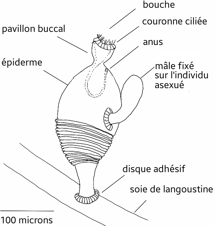 Représentation schématique d'un individu asexué fixé sur une soie de langoustine